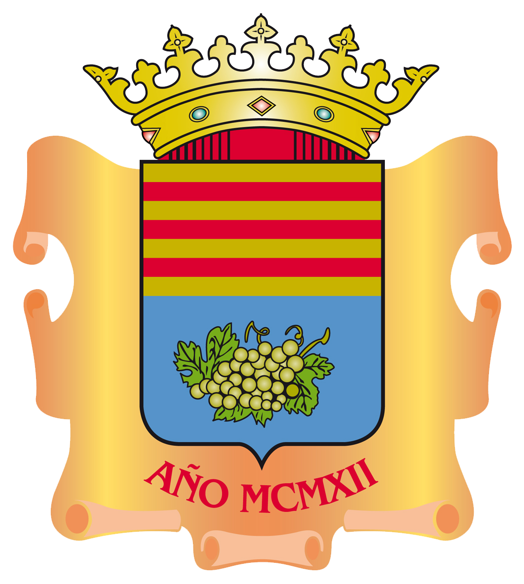 Escudo de Moriles (Córdoba)